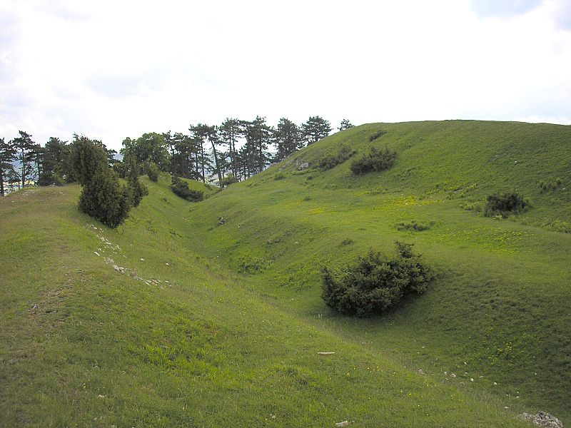 Ipf bei Bopfingen (Ostalb). Der Wallgraben um das Gipfelplateau. Ostseite nach Süden.